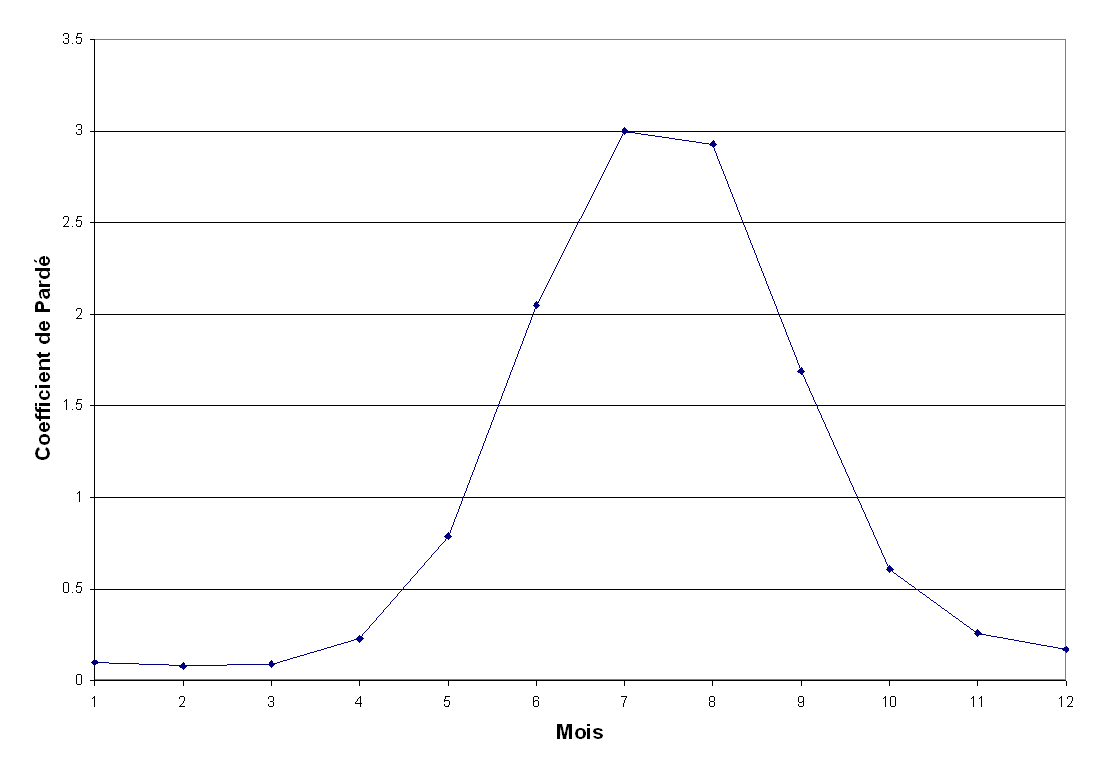 Coefficients de Pardé pour la Kander à Gasterntal. Courbe représentative d'un régime glaciaire. Période de mesure : 1951 - 1980.